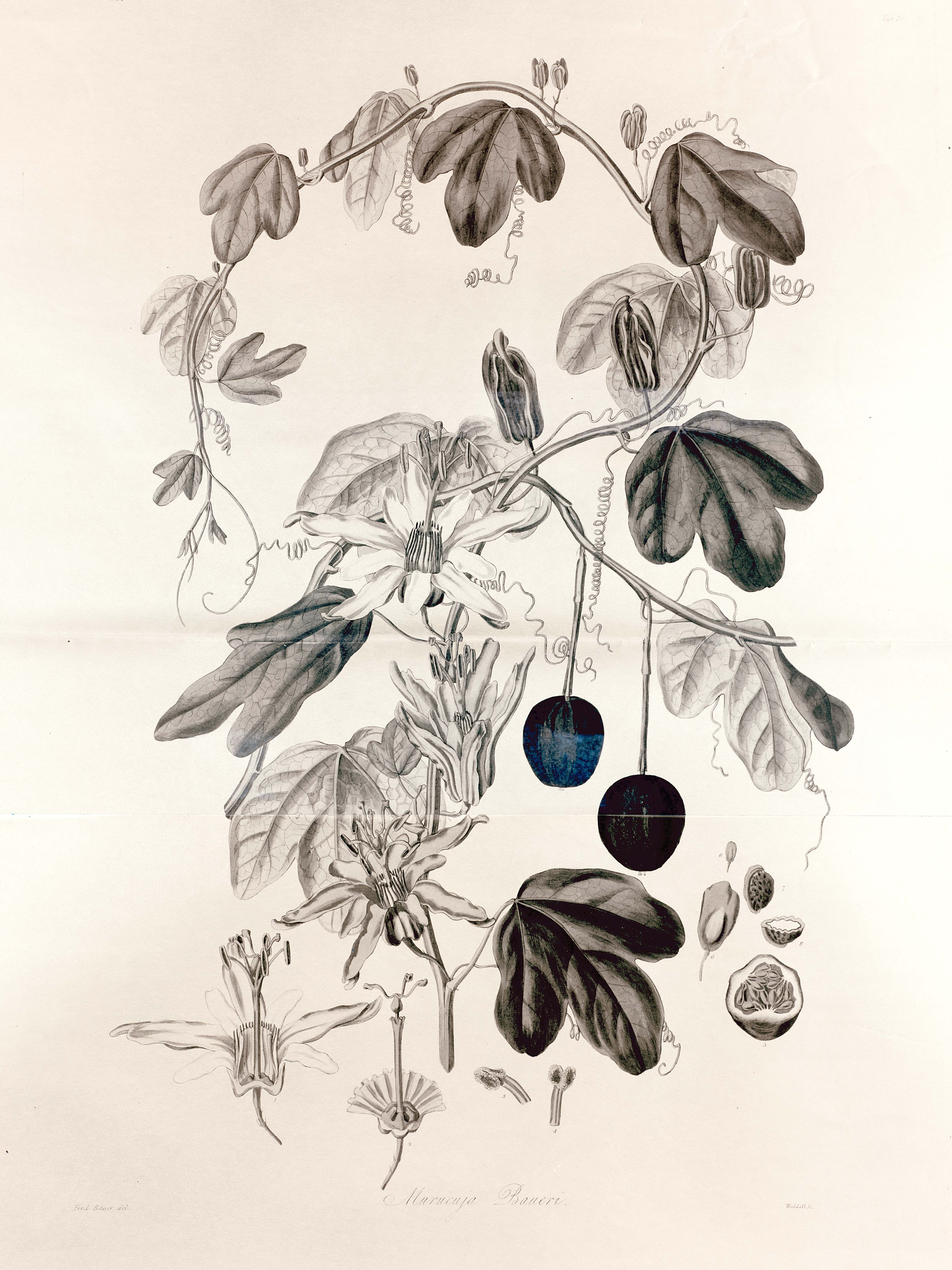 Murucuja baueri (=Passiflora aurantia)